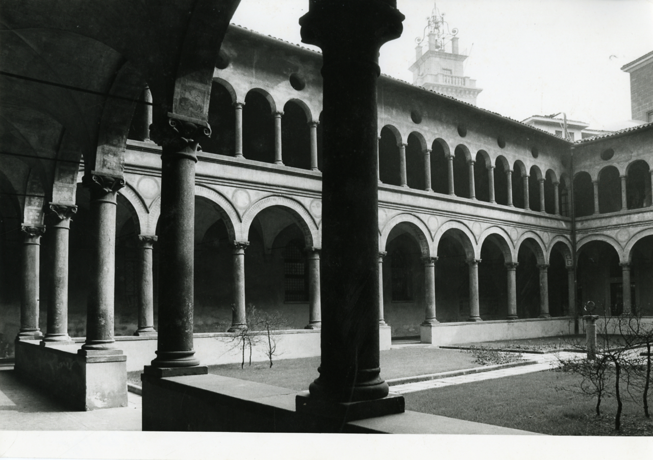 Servizio fotografico : Bergamo, 1981 / Paolo Monti, Istituto di fotografia Paolo Monti. - Stampe: 3 : Positivo b/n, gelatina bromuro d'argento/ carta, 24x30. - ((Al verso delle stampe manoscritti i numeri dei negativi corrispondenti (formato 35 mm) con indicazione del fotogramma: 3458/35, 3459/20, 3620/35; timbri a inchiostro con copyright (Corso Sempione - Milano) e "Istituto di Fotografia/ Paolo Monti". - Sul coperchio della scatola iscrizione didascalica manoscritta a pennarello nero: "Architettura/ Lombardia Veneto". - Occasione: Documentazione per la pubblicazione: Fumagalli Alberto, "Bergamo: origini e vicende storiche del centro antico", Milano, Rusconi immagini, 1981. - Fonte: Agenda di Paolo Monti: Nikon Leika 3001-/ Monti 1978 (1978-1982), presso Archivio Paolo Monti. - Fonte: Fattura di Paolo Monti: IV. Commesse/ Fattura n. 15/ Vostro volume illustrato Bergamo Alta (1980/05/18), presso Archivio Paolo Monti. Servizio fotografico in b/n per le illustrazioni del volume. Alla Società Rusconi vengono ceduti tutti i diritti di riproduzione anche per le eventuali coedizioni estere. - Fonte: Monografia di Fumagalli, Alberto: Bergamo: origini e vicende storiche del centro antico, Milano, Rusconi immagini (1981)